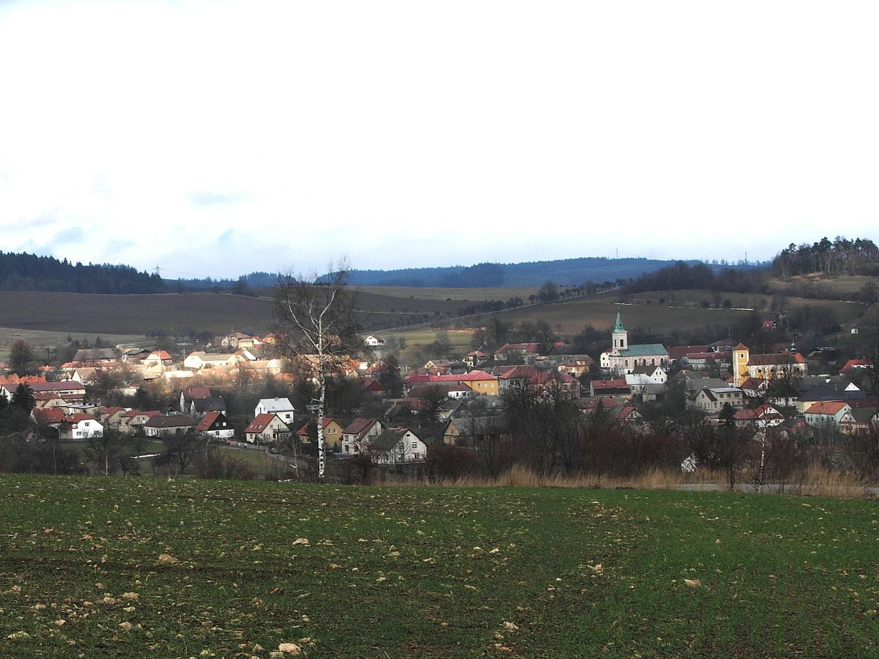 Obec Rovečné od silnice na Věstínek.